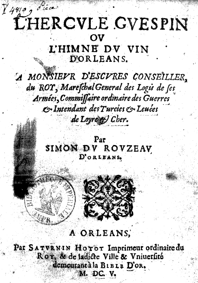 Couverture de l'ouvrage de Simon du Rouzeau. L'Hercule guespin, ou l'hymne du vin d'Orléans : à monsieur d'Escures, conseiller du Roy, maréchal général des logis de ses armées, commissaire ordinaire des guerres et intendant des levées et turcies de Loyre et Cher, Saturnin Hotot, imprimeur ordinaire du Roy, Orléans, 1605, 31 p.